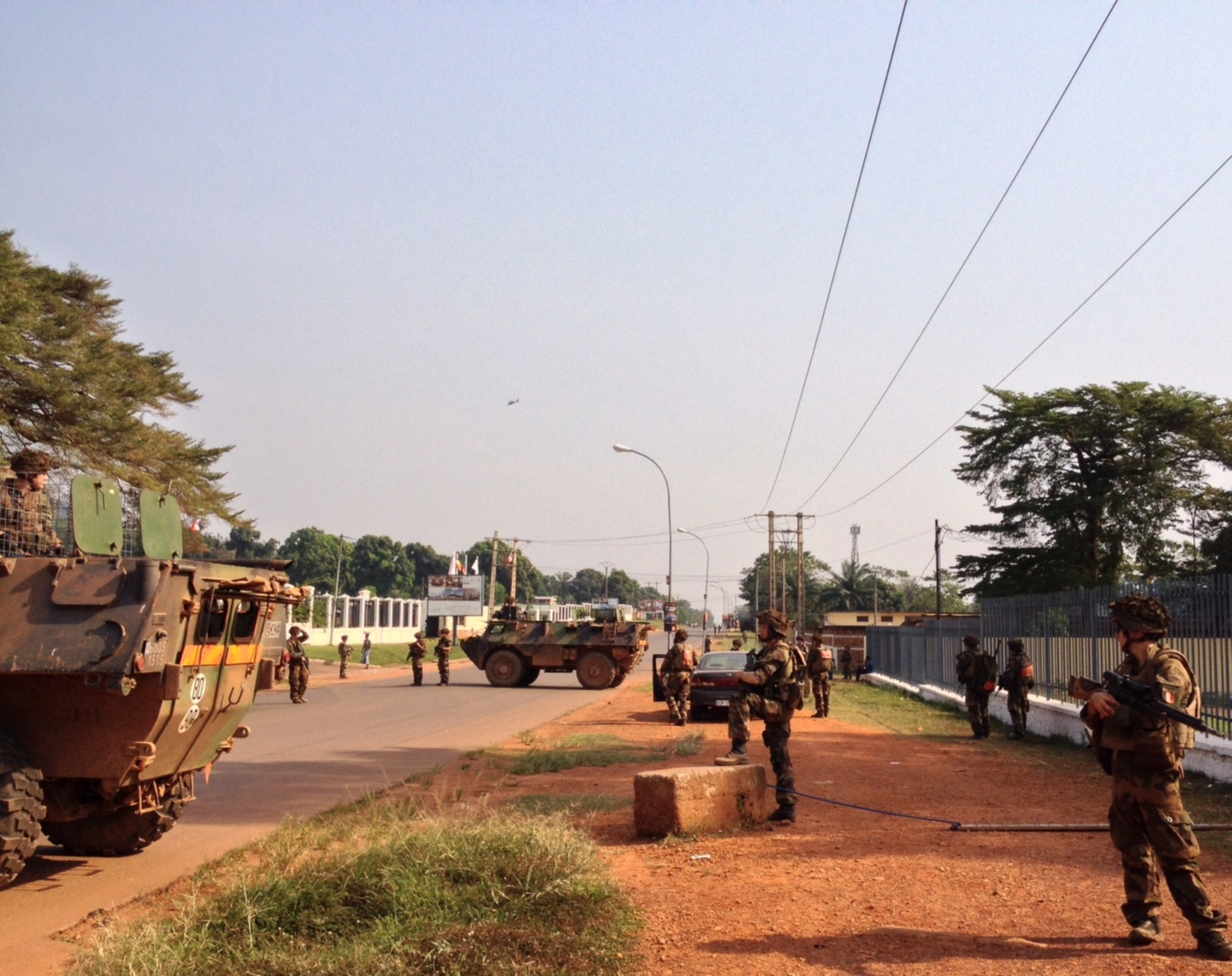 Les soldats français en position à Bangui, République Centrafricaine. Décembre 22, 2013